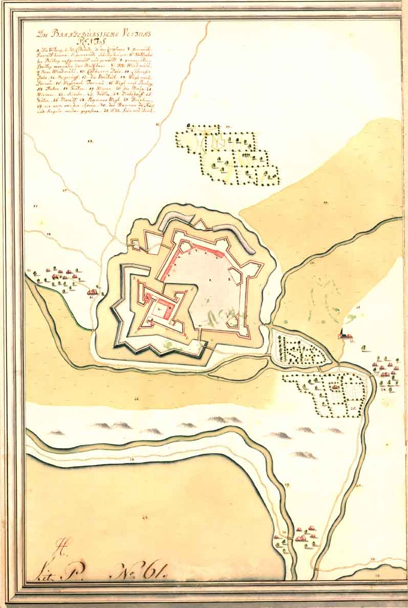 Peitz Die Brandebürgische Vestung Peitz